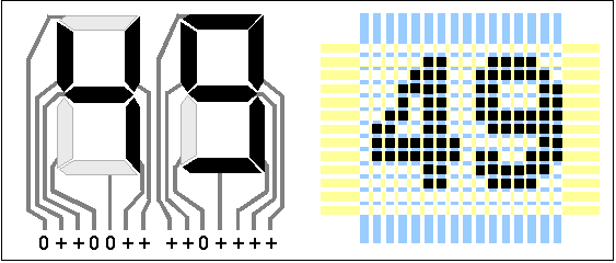 Segment-addressable and pixel-addressable LCD B&W devices Personal drawing